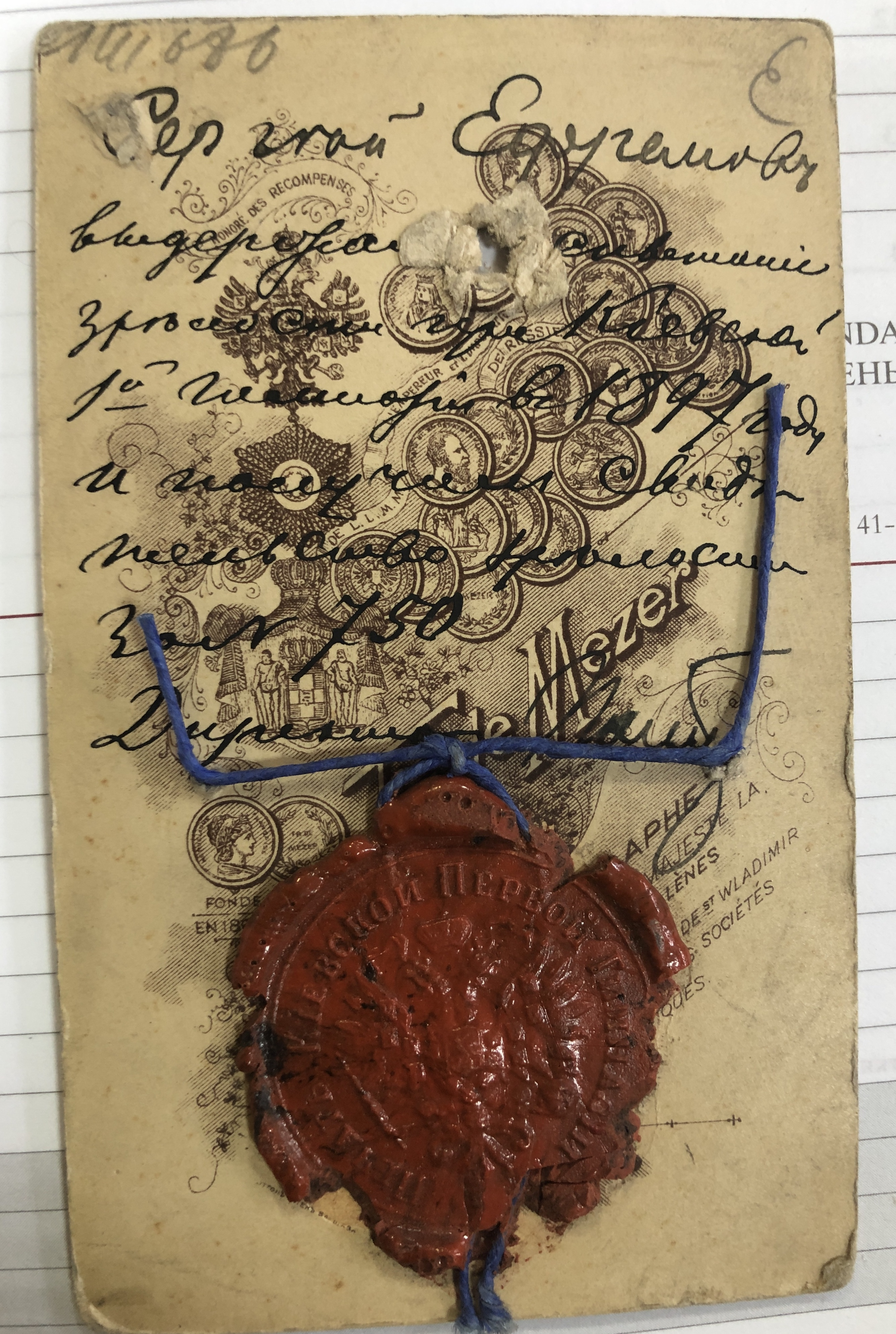 Зворот фото з особистої справи студента університете св Володимира Єфремова Сергія Олександроаича